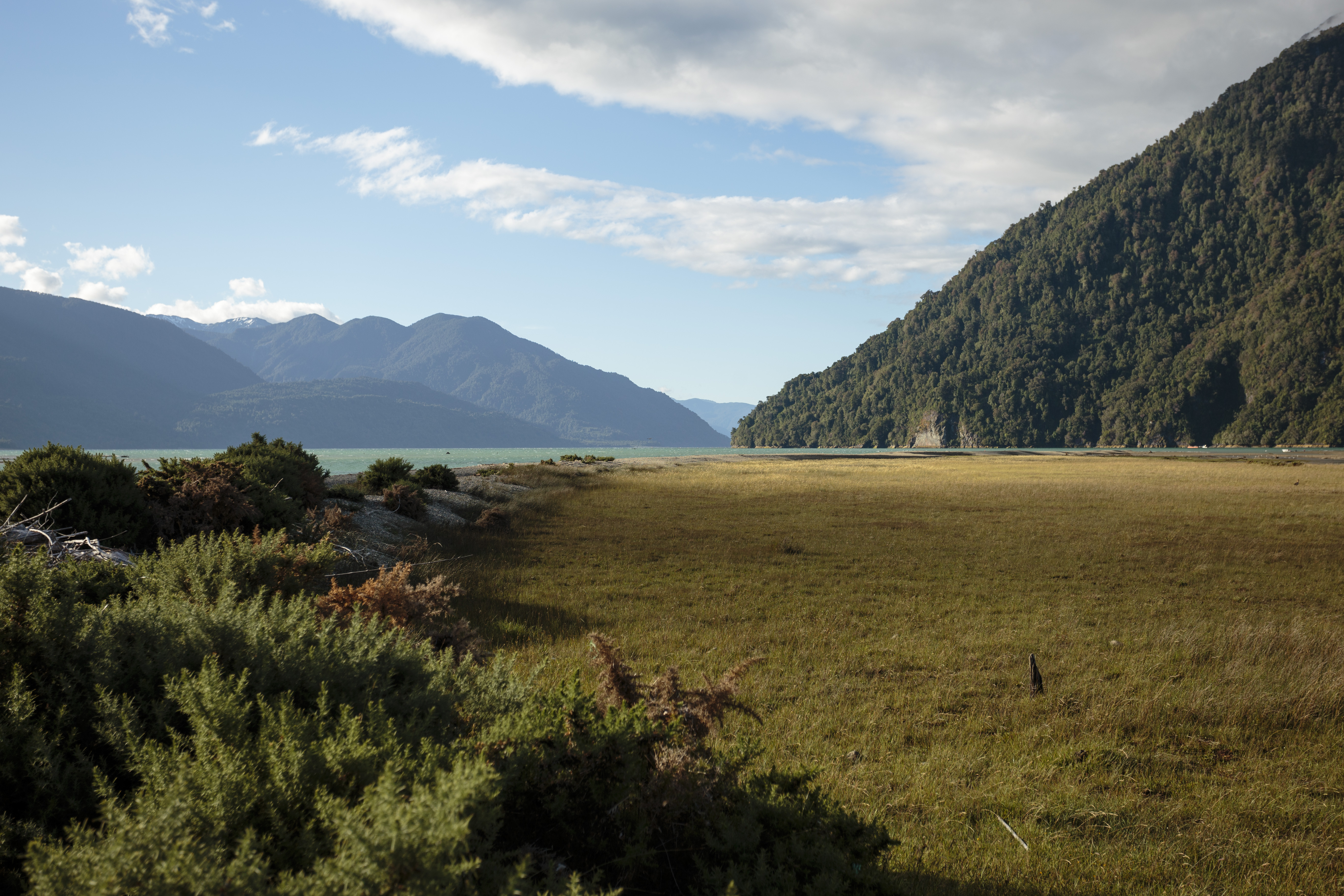 hualaihué